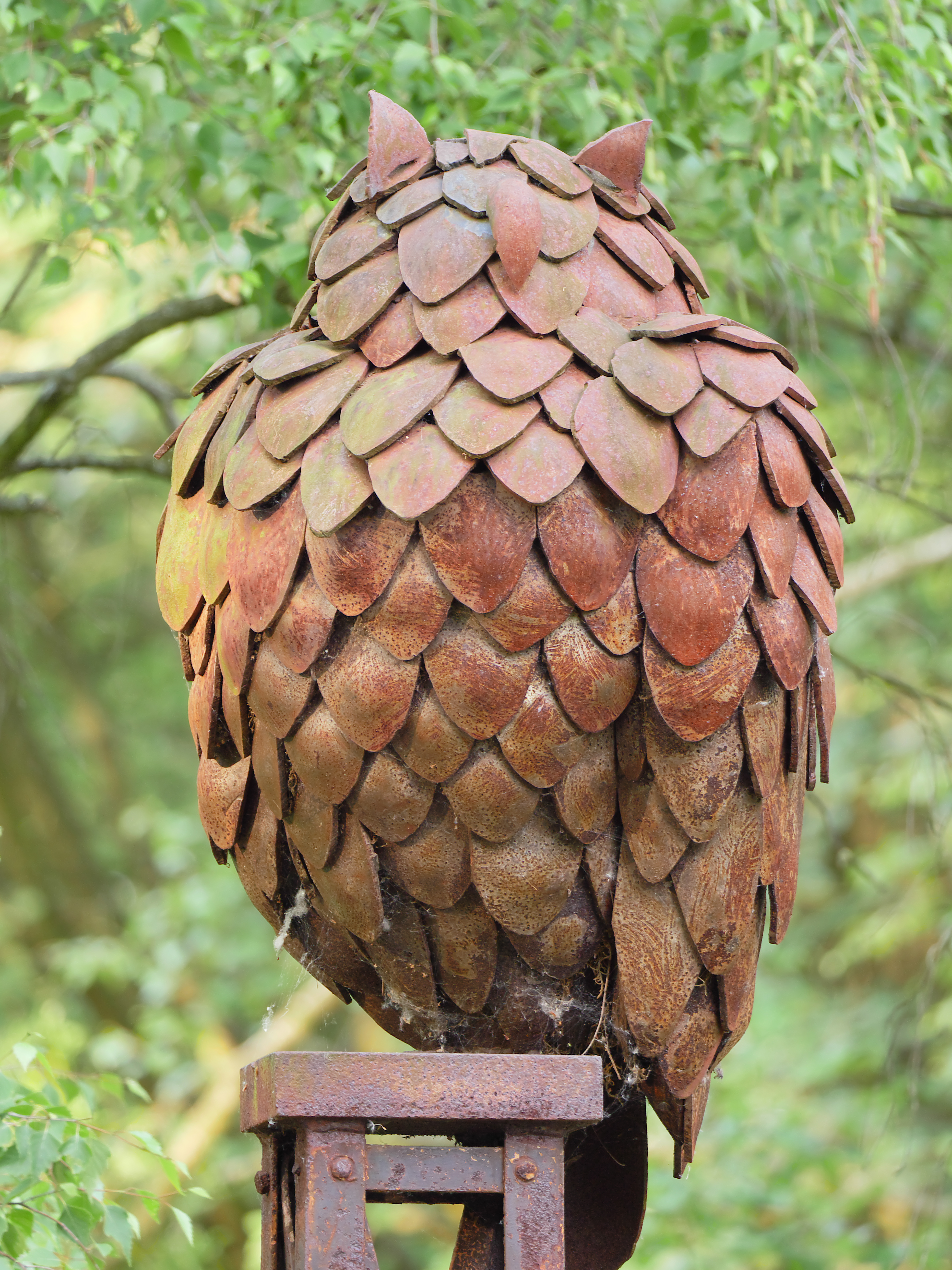 Eulenskulptur im Naturpark Schöneberger Südgelände